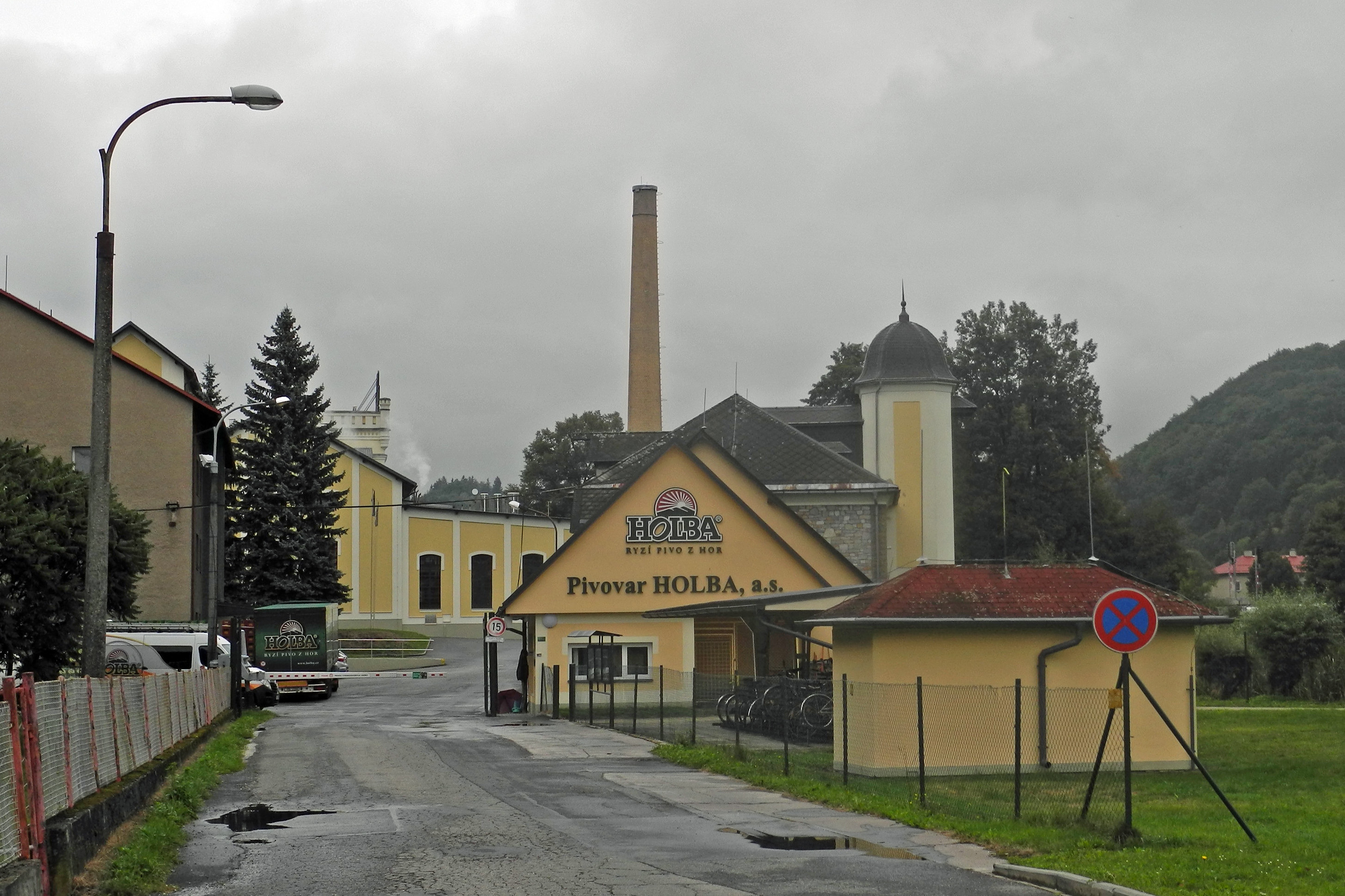 Brauerei Holba (ehem. Brauerei von Chiari & Co. in Halbseit) in Holba, OT von Hannsdorf (Hanušovice)